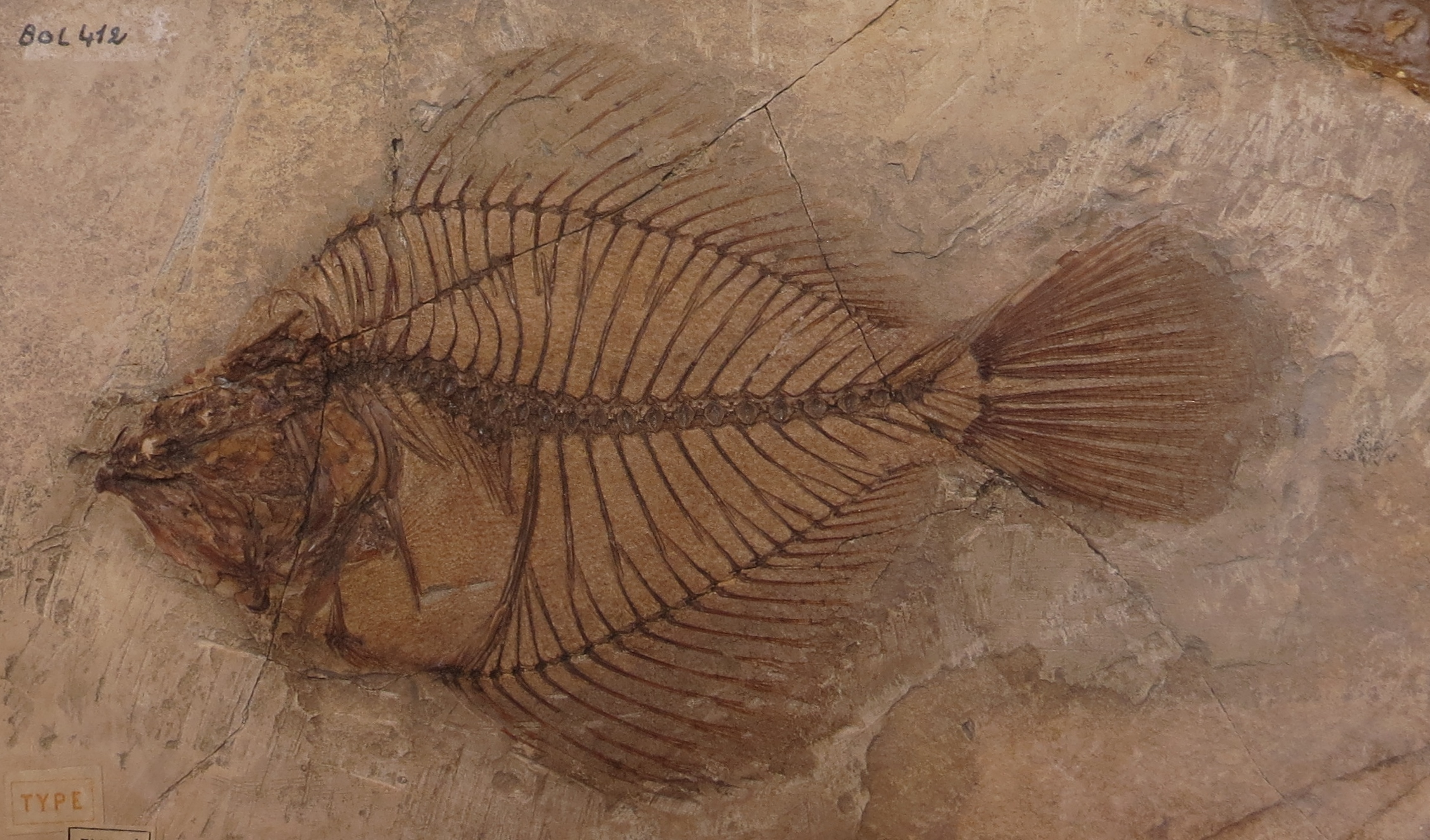 Amphistium paradoxum fossil